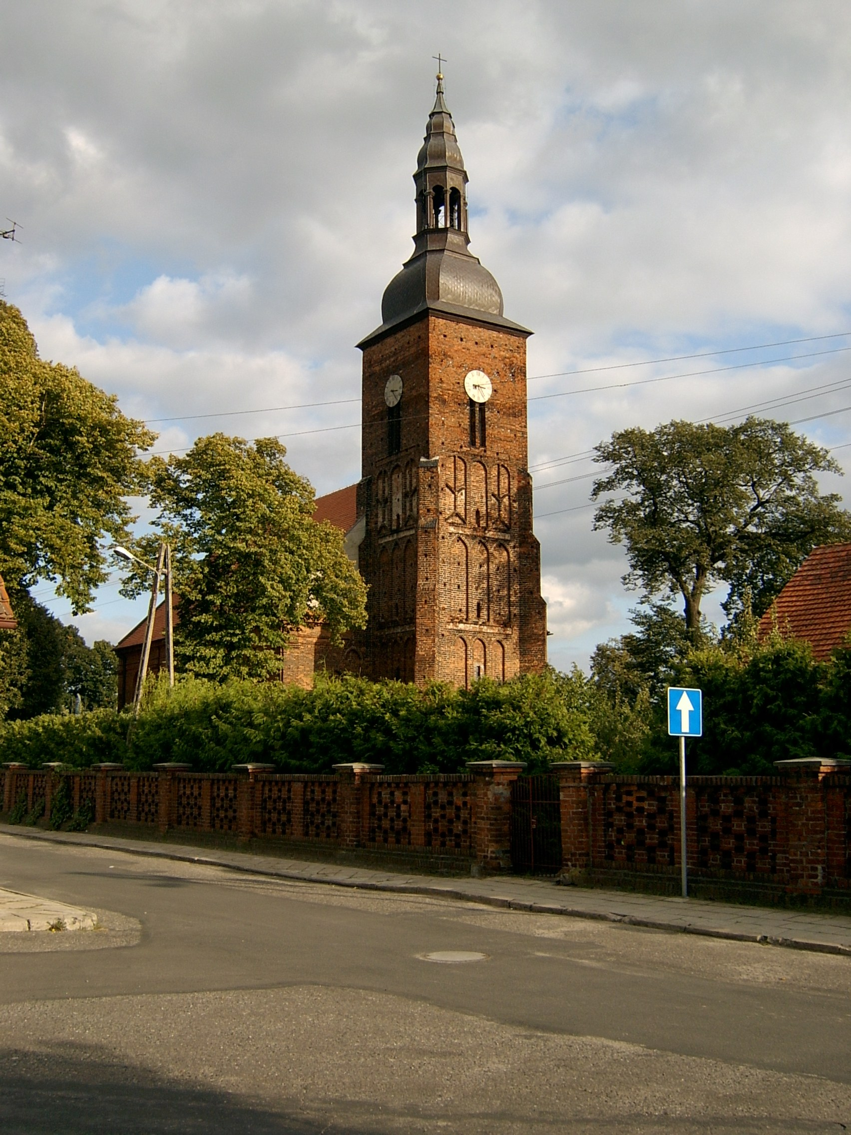 Kirche in Święciechowa, Wojewodschaft Großpolen, Polen.